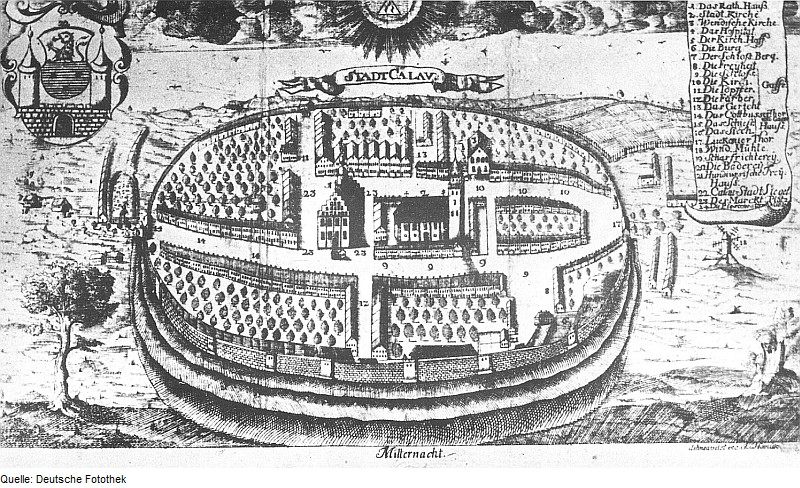 Original image description from the Deutsche Fotothek Calau. Stadtansicht mit Bockmühle, 1758